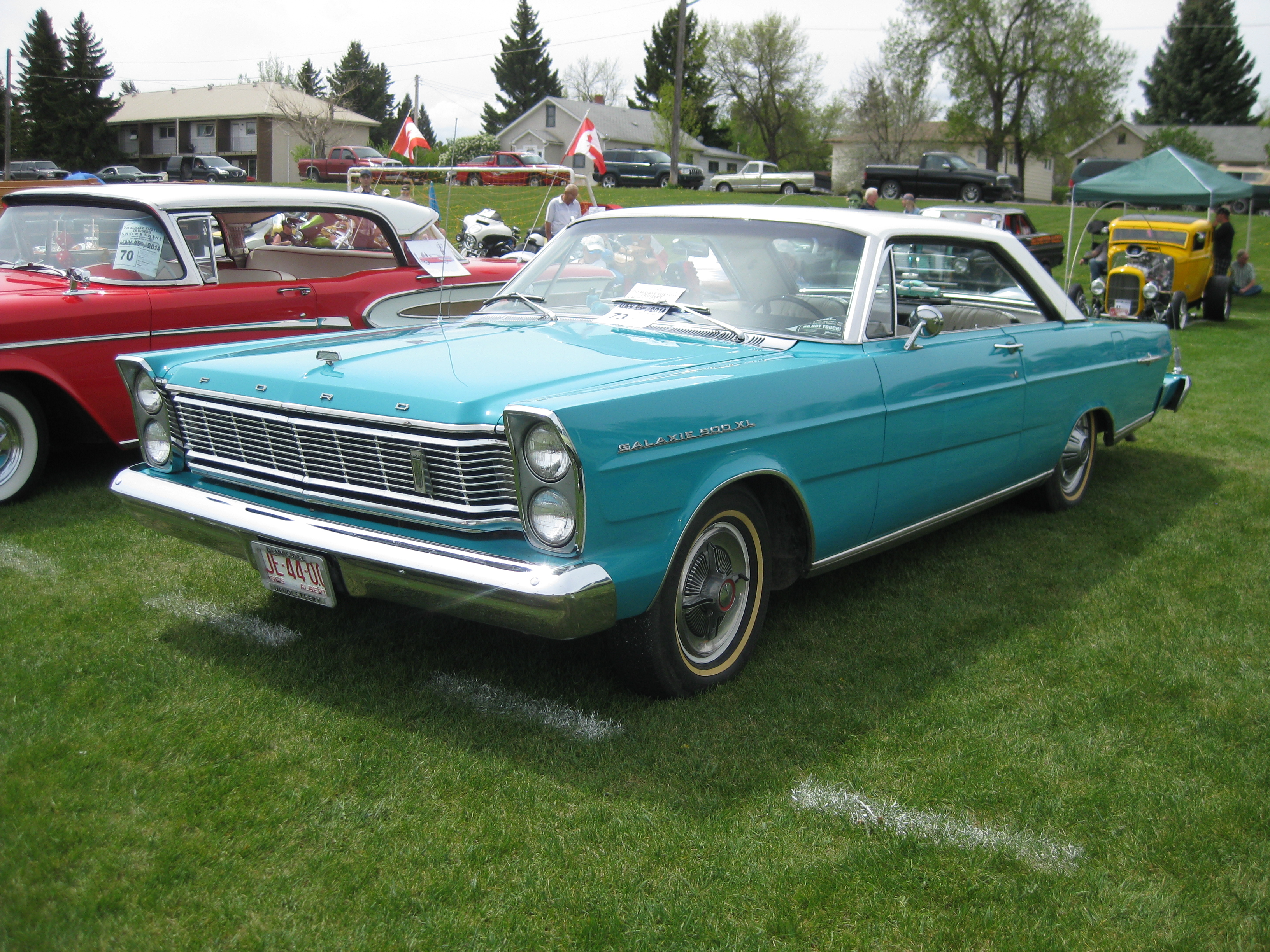 1965 Ford Galaxie 500/XL 2-Door Hardtop